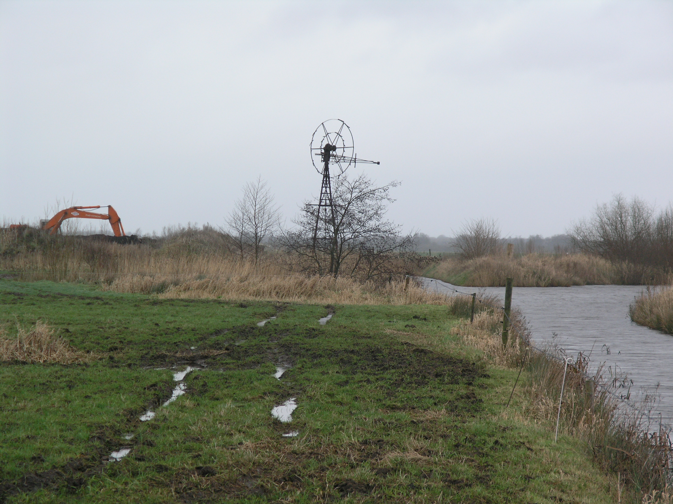 Nijeholtpade Windmotor Restant